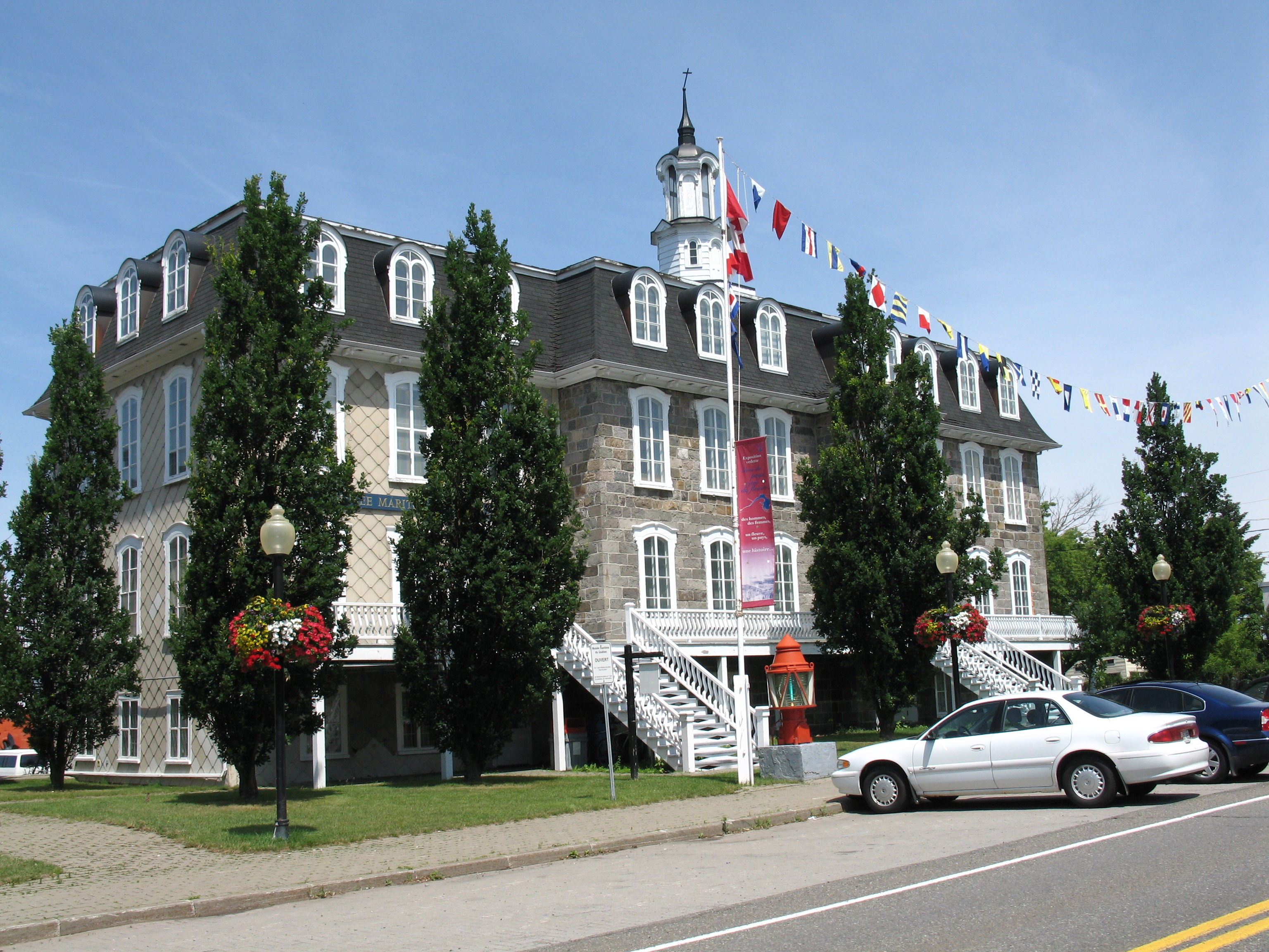 Façade du Musée maritime du Québec, situé à L'Islet, Québec.